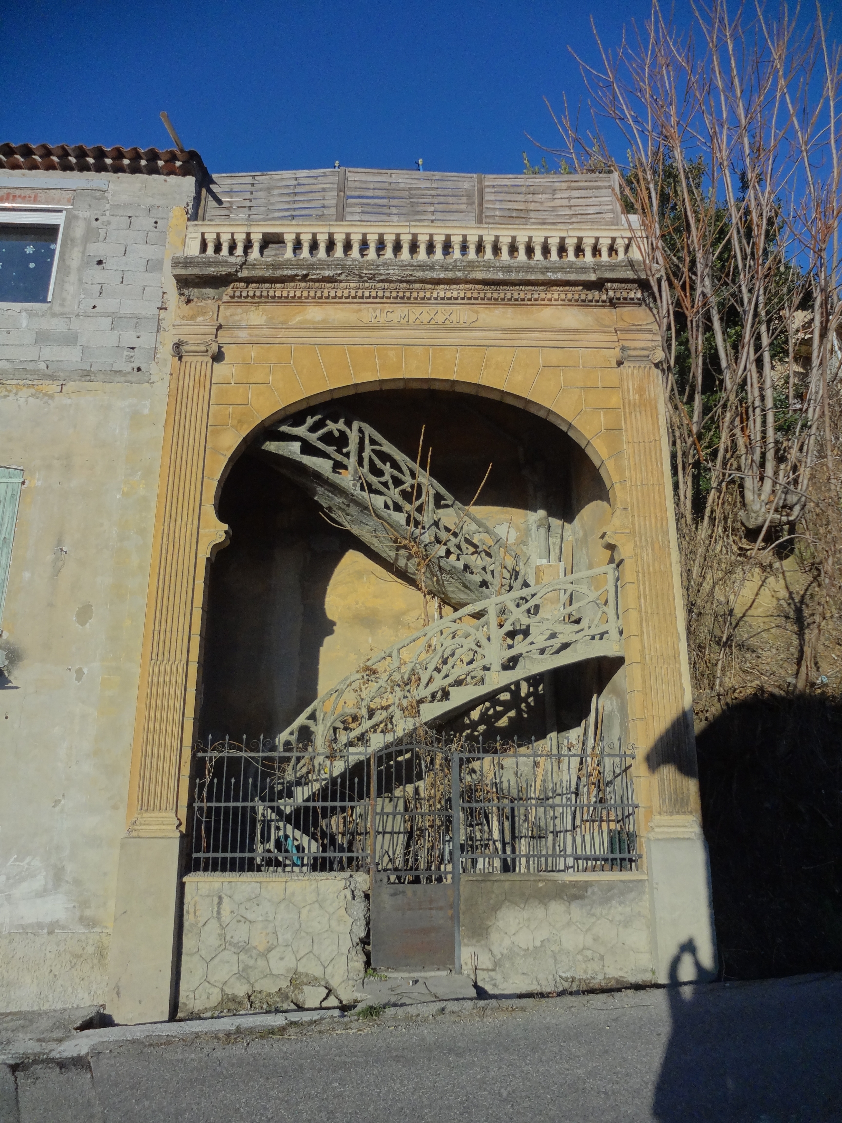 Escalier privé monumental, reliant un jardin à la rue